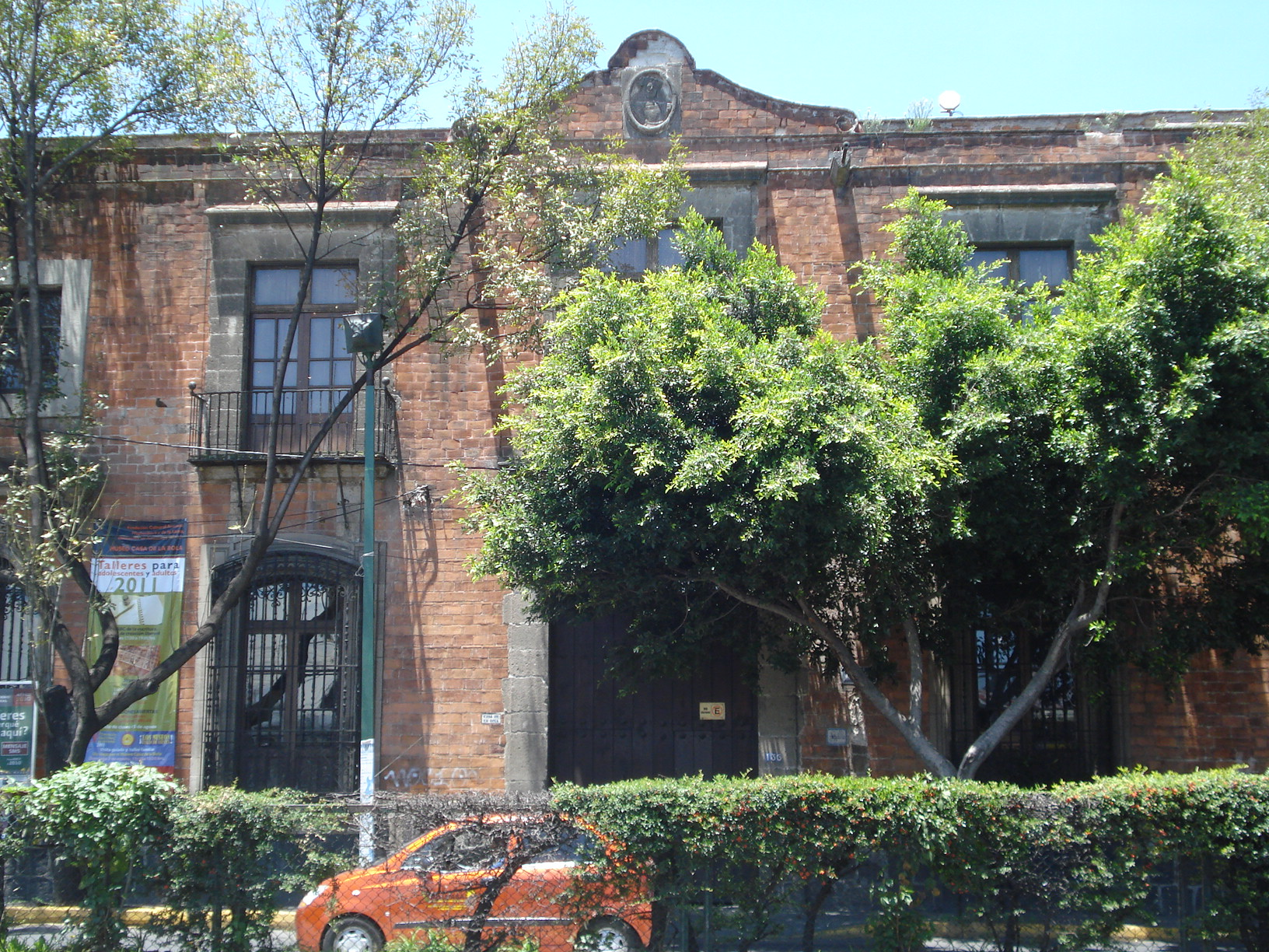 Fachada principal de la Casa de la Bola. Tacubaya, México, D. F. En el remate nótese el medallón con la efigie de Don Juan Suárez de Peralta labrado en cantera